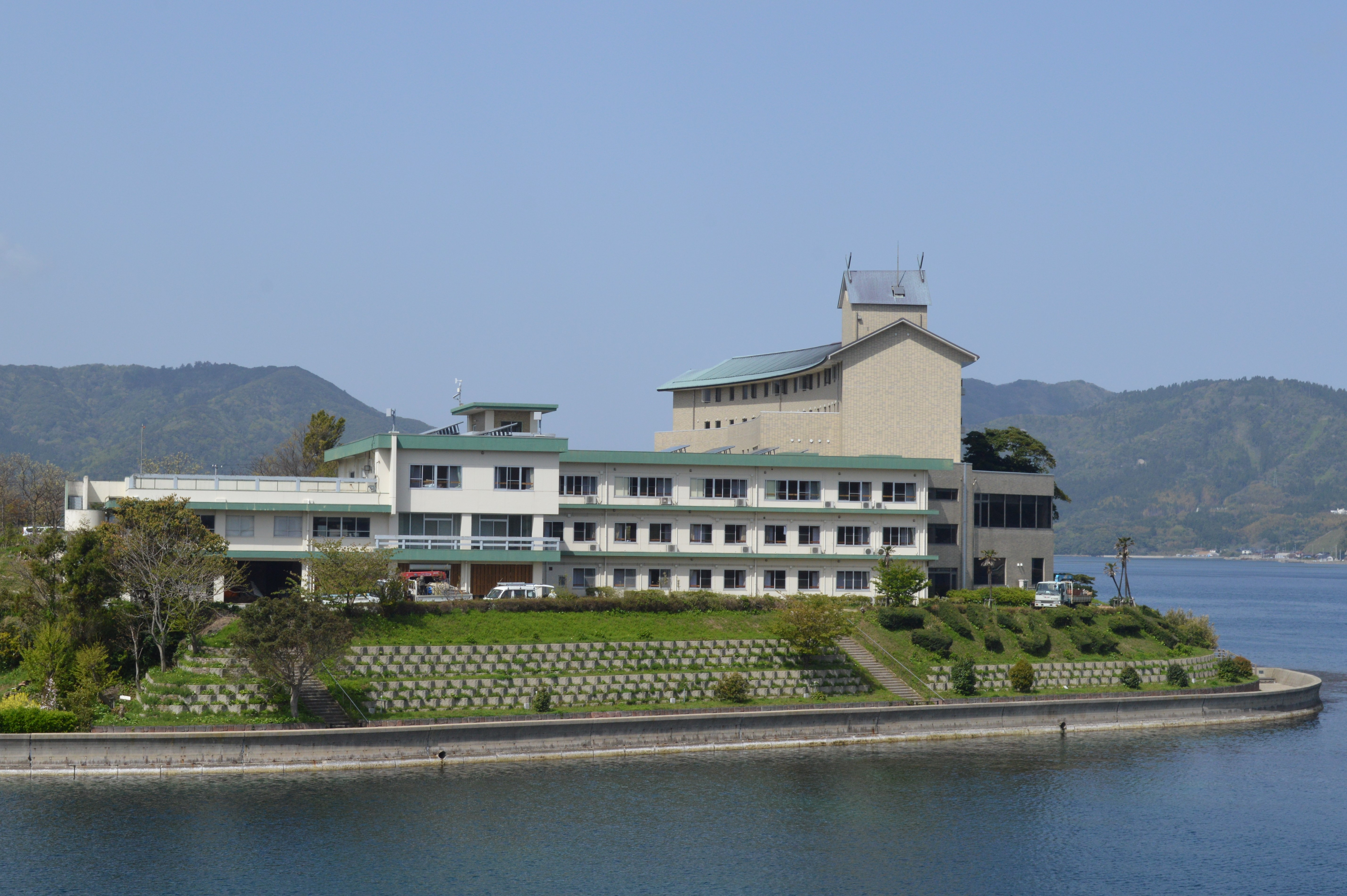 島根県隠岐郡海士町の菱浦港にあるマリンポートホテル海士。